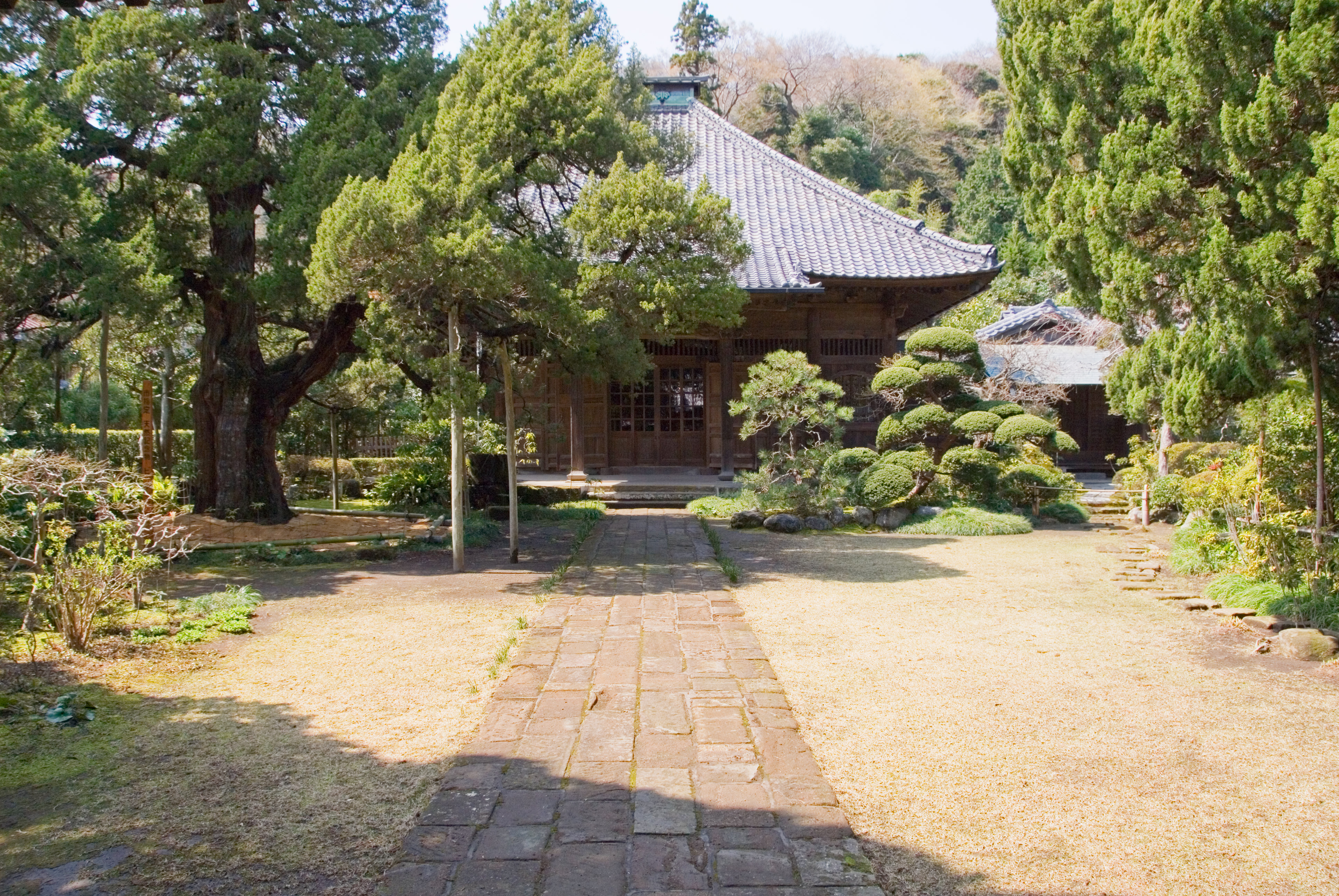 Jufuku-ji's Main Hall, Kamakura